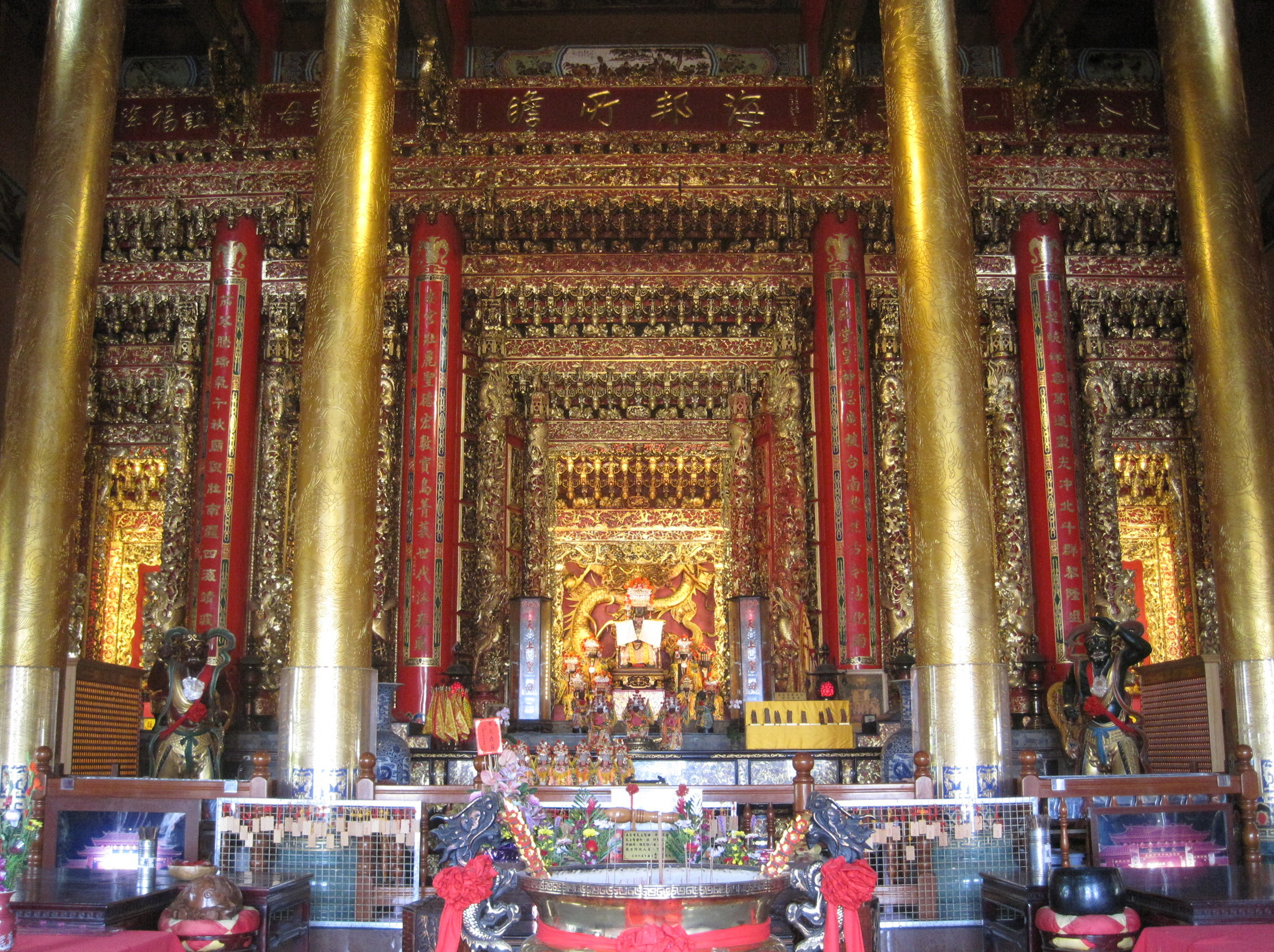 下茄苳泰安宮內部